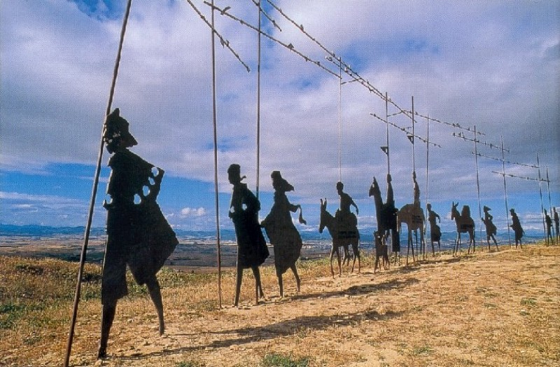 Date du cliché : septembre 2001.